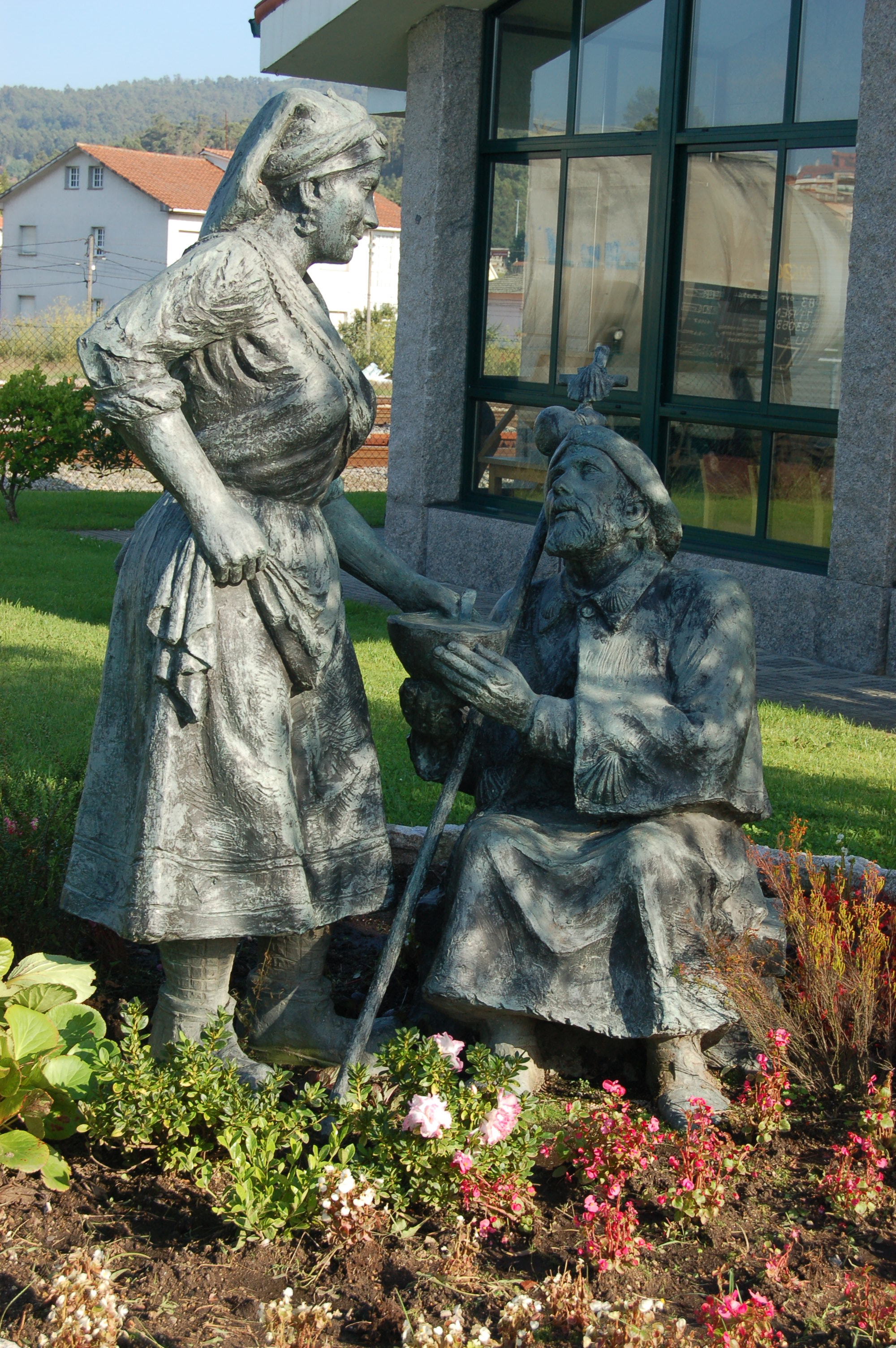 Estatua de auxilio a un peregrino no albergue de Pontevedra, situado á beira do camiño portugués.